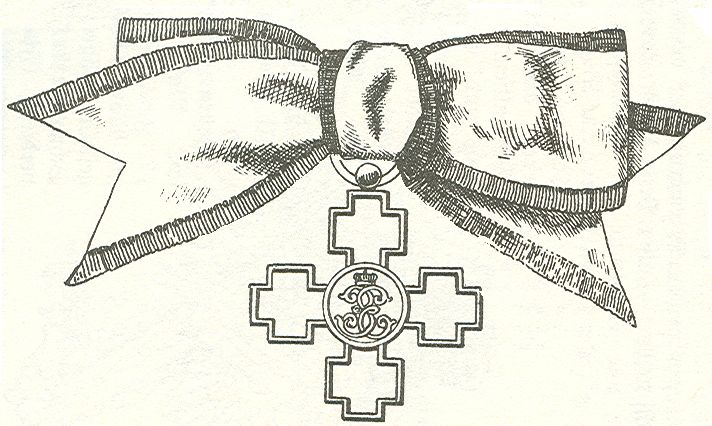 Herinneringskruis